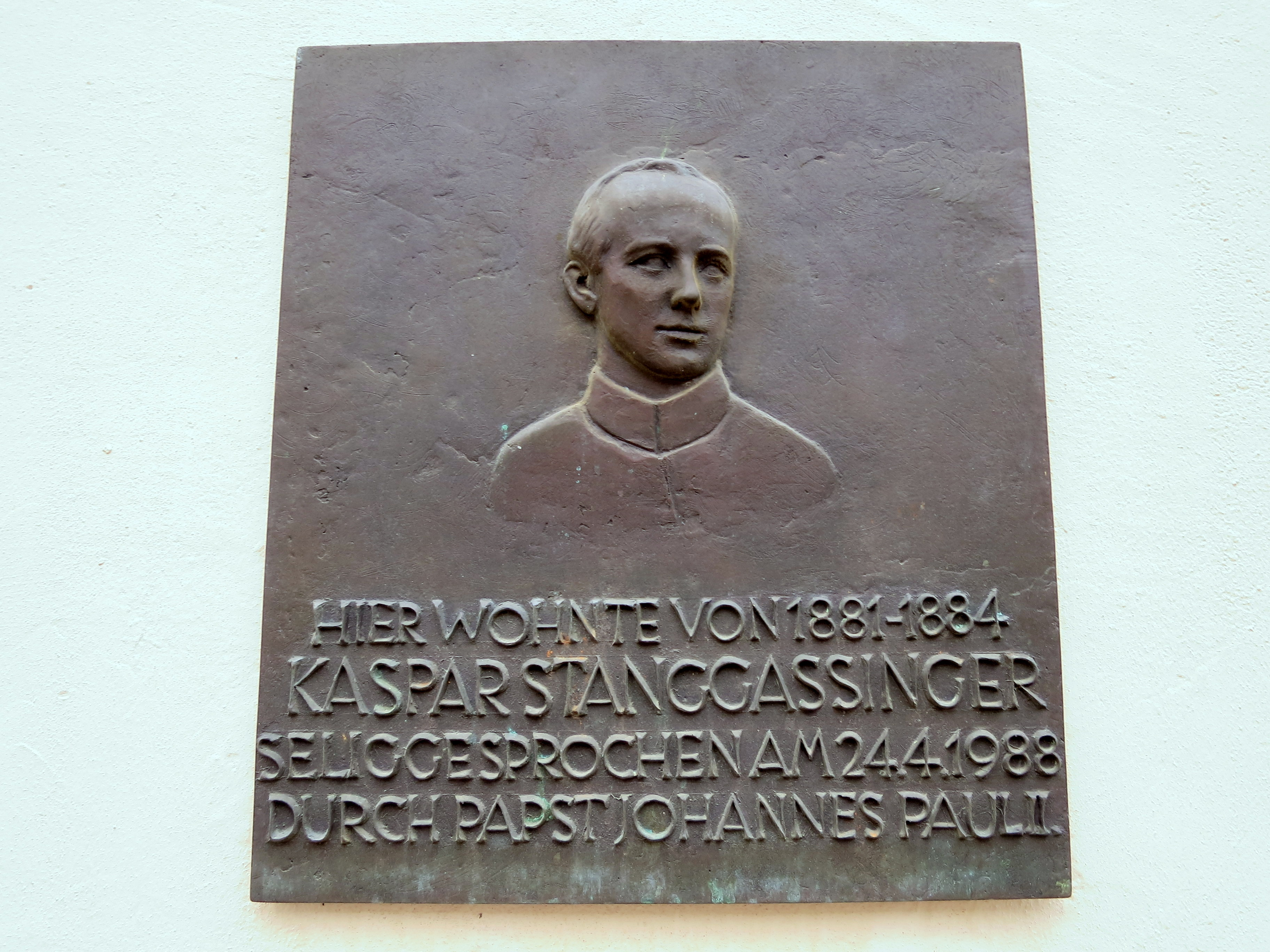 Gedenktafel an Seligsprechung; Rindermarkt 9